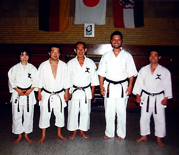 Internationaler Karate-Lehrgang des Gōjū-Ryū Yuishinkan in Kamen 1998; in der Mitte Kisaki Tomoharu